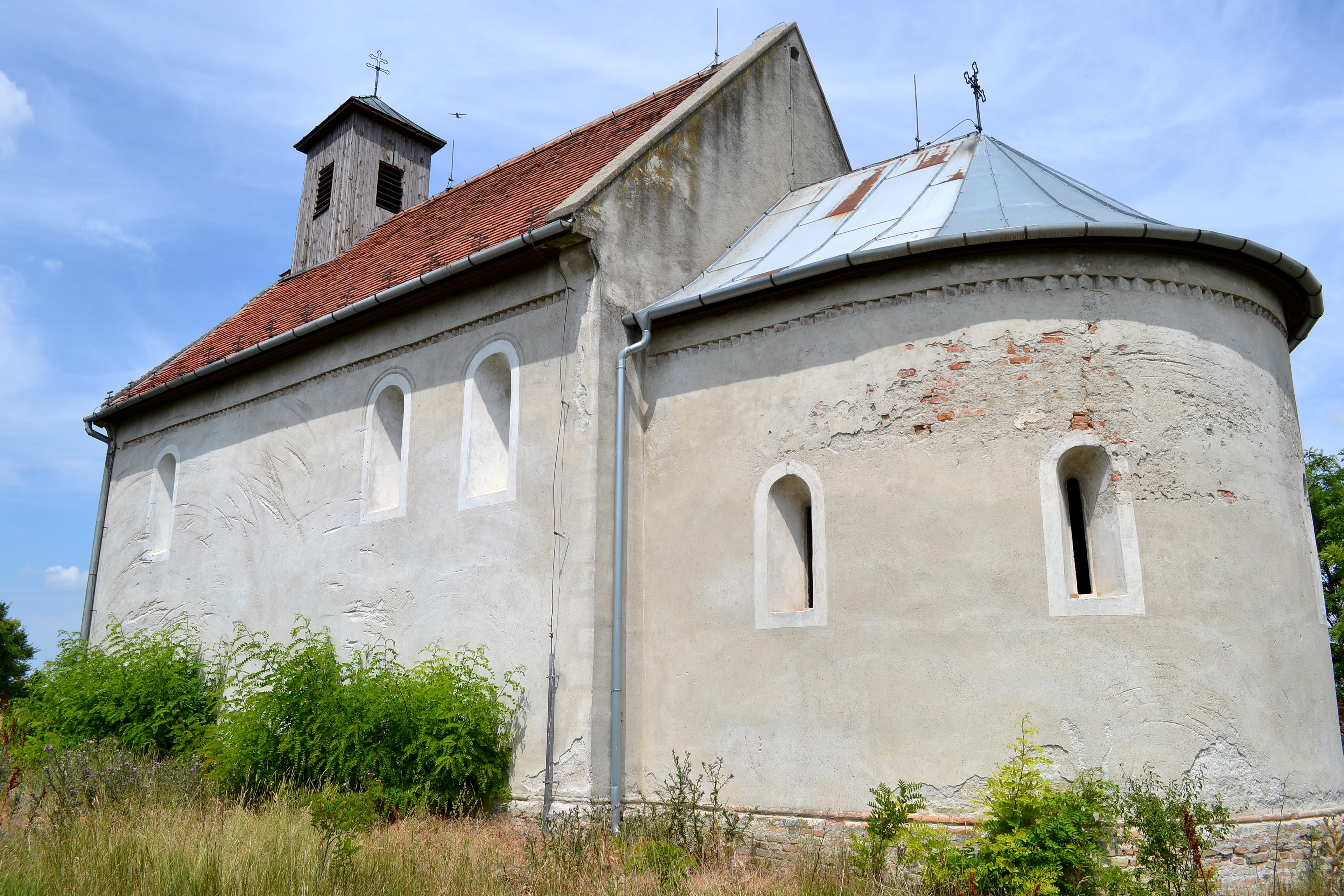 Kostol svätej Margity Antiochijskej v Šamoríne-Šámote; celkový pohľad Object location48° 02′ 00.96″ N, 17° 20′ 59.28″ E